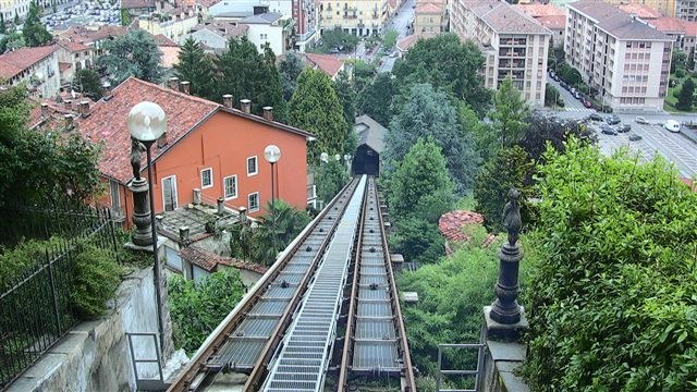 Biella, funicolare per il Piazzo (veduta dall'alto)